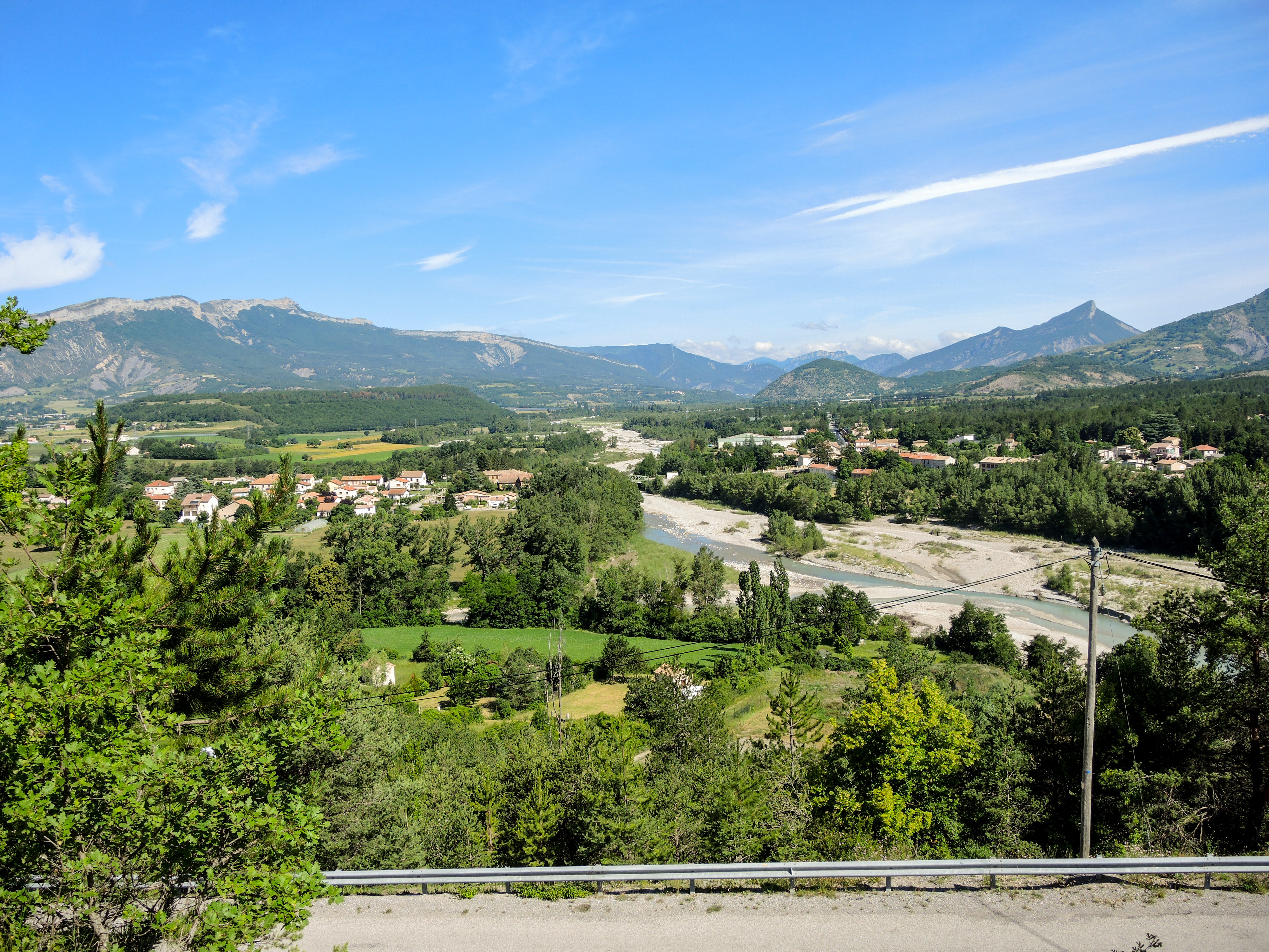 Eyguians et Pont-Lagrand, vus de la route de Saléon. Hautes-Alpes